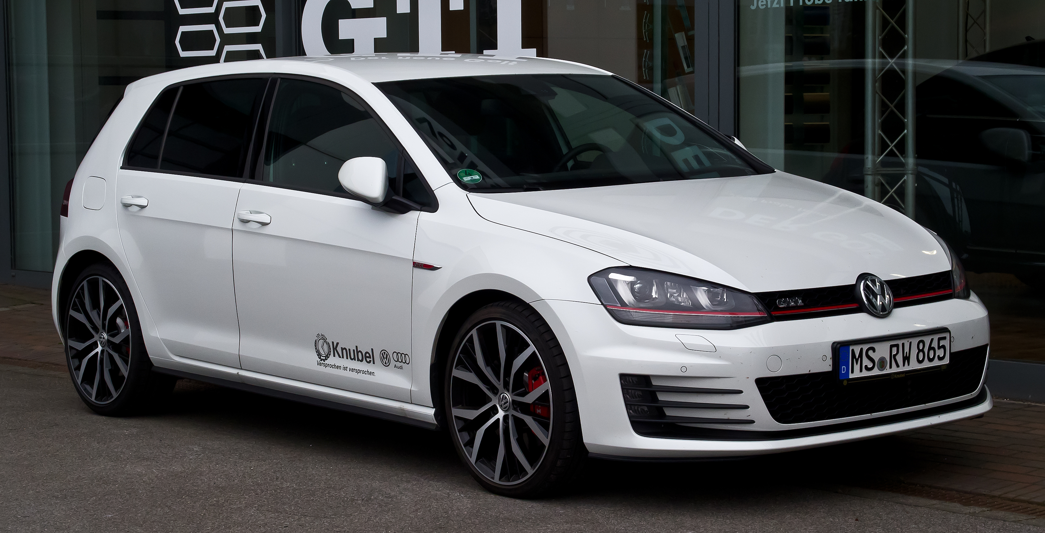 VW Golf GTI (VII)